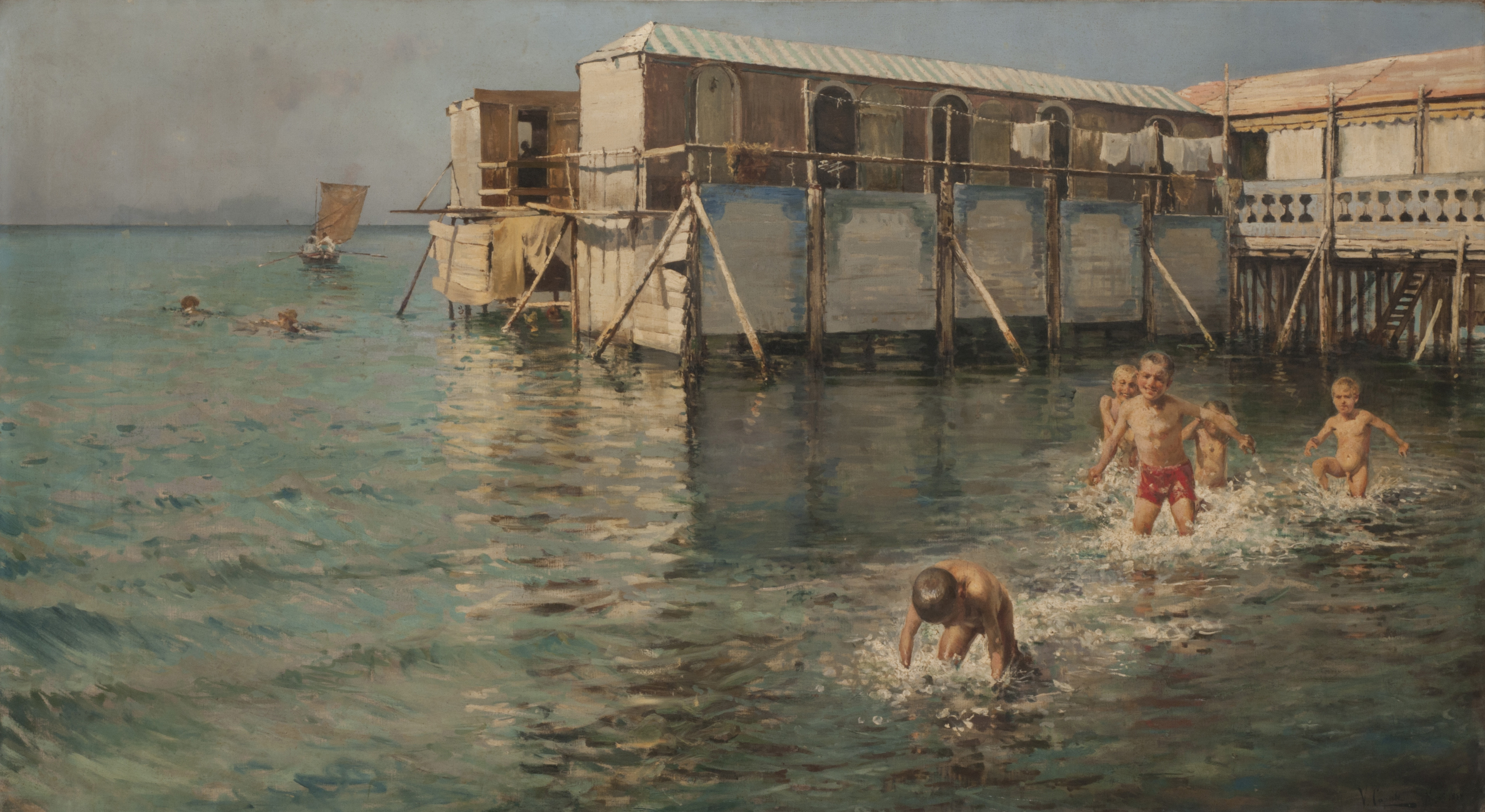 Vincenzo Caprile, Baños de mar (Guaglioni). 1887. 83 x 150,5 cm, óleo sobre tela. Inv. 5824.